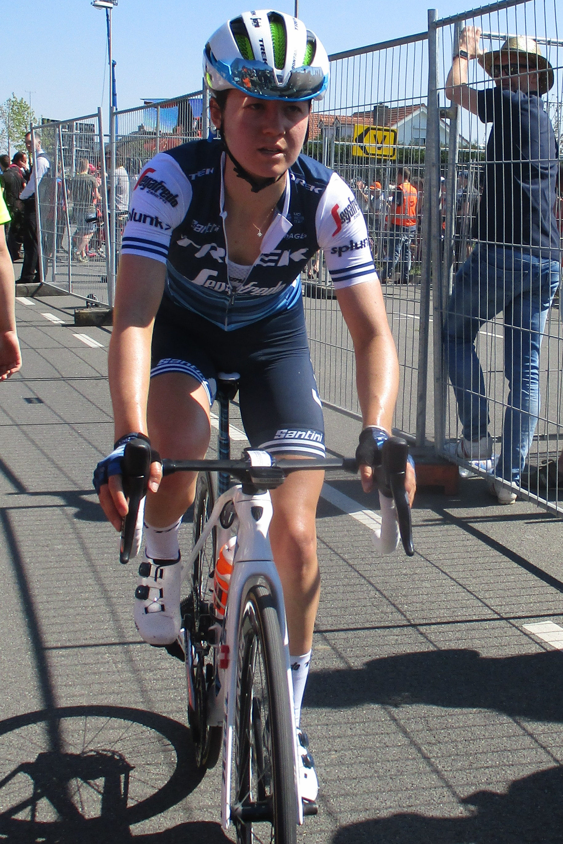 Finish van de Amstel Gold Race Ladies Edition 2019